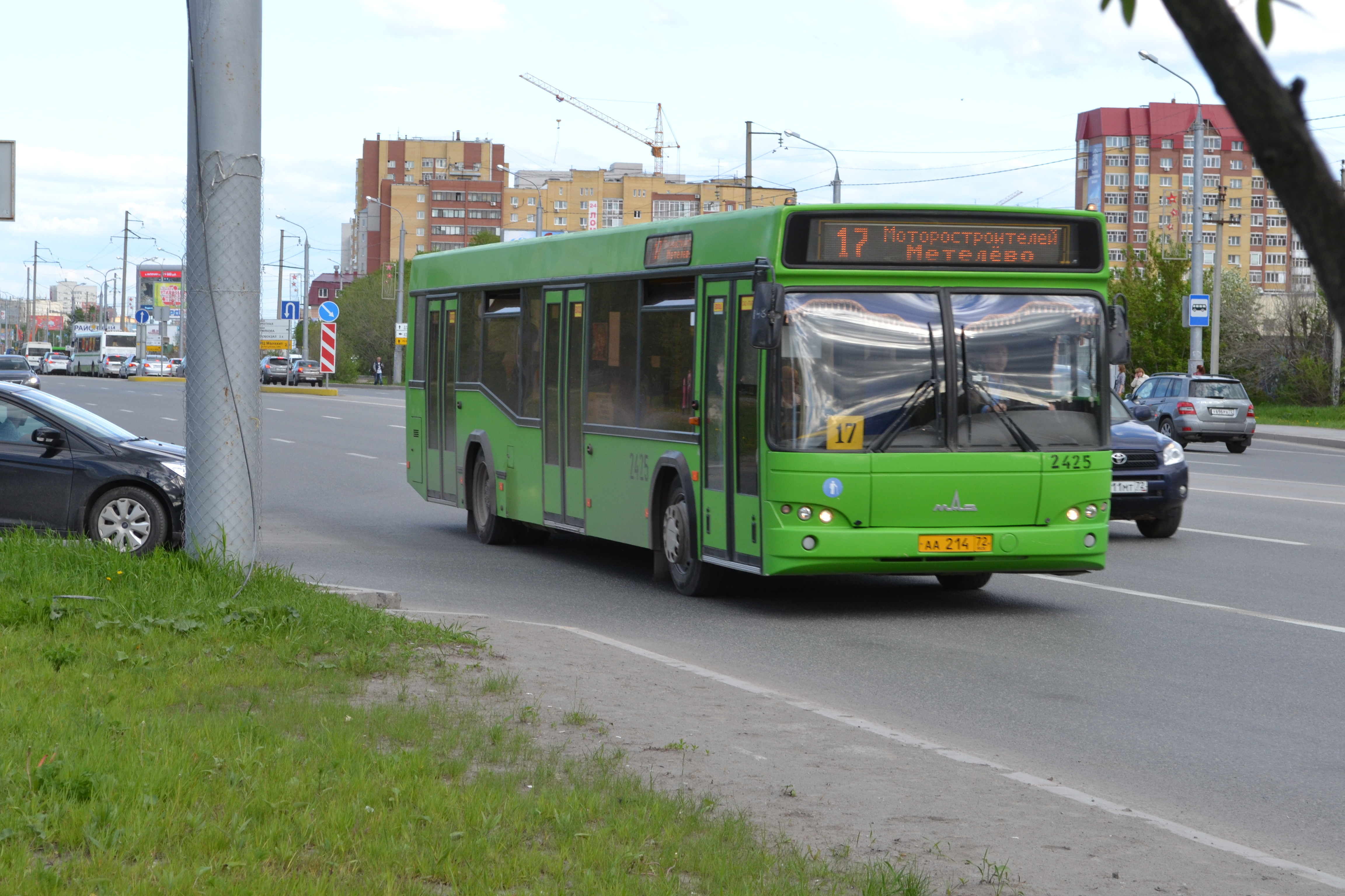 МАЗ-103.469 Тюмень